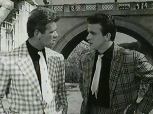 Renato Salvatori e Maurizio Arena in una scena del film Poveri ma belli (1956)